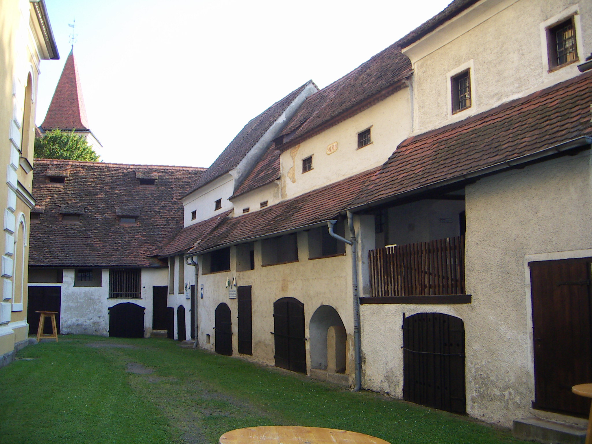 Leonhardskirche (Feldbach) links, Hof mit Tabor hinten und rechts